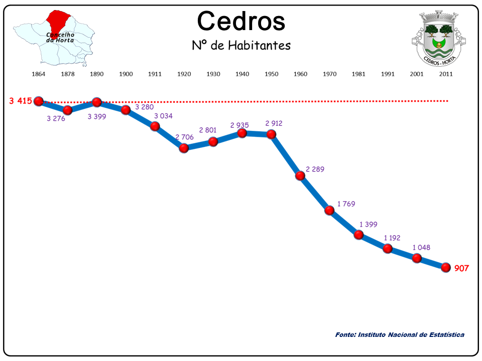 População